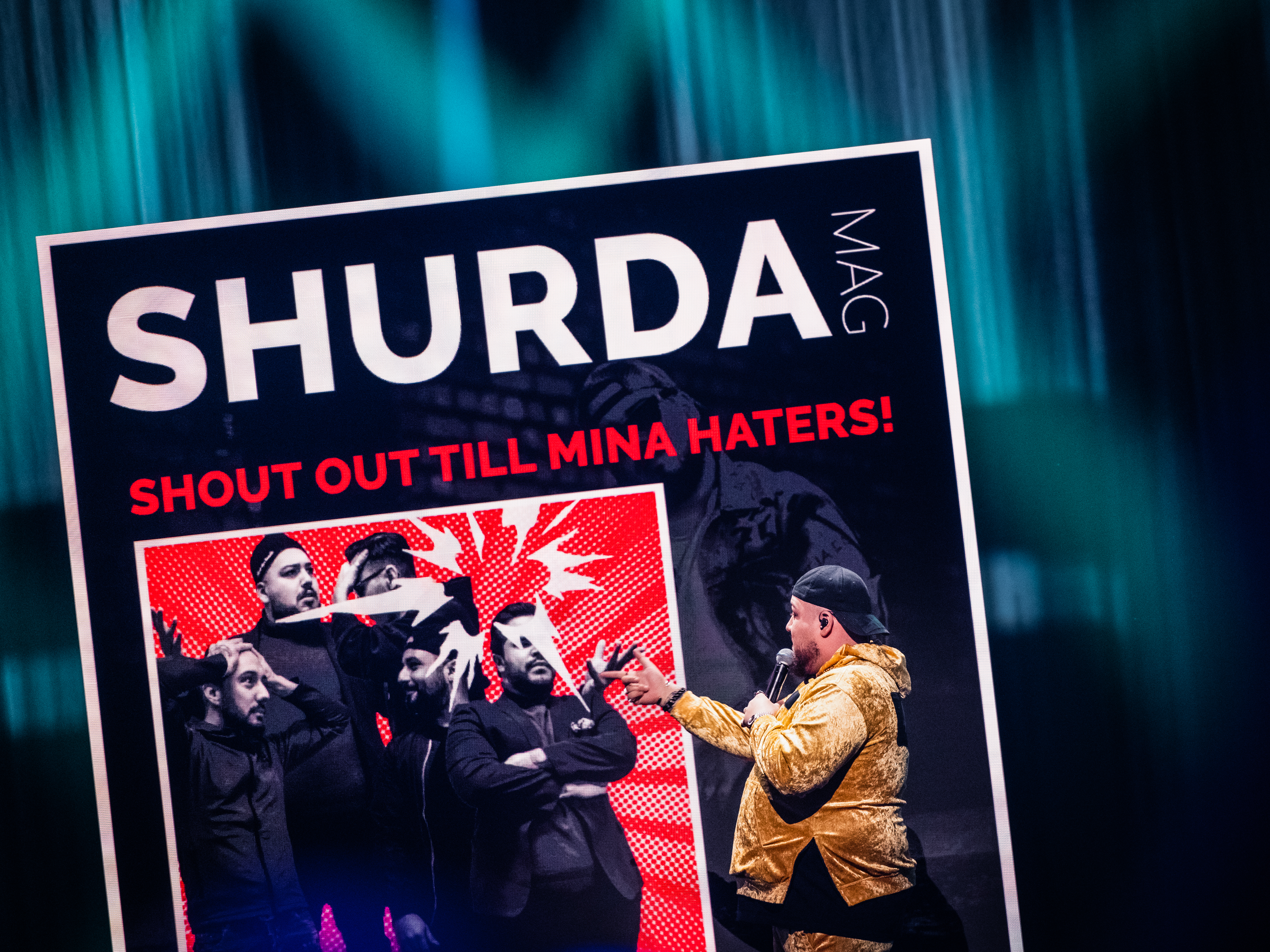 Anis Don Demina framträder vid finalen i Melodifestivalen 2020 med låten "Vem e som oss"